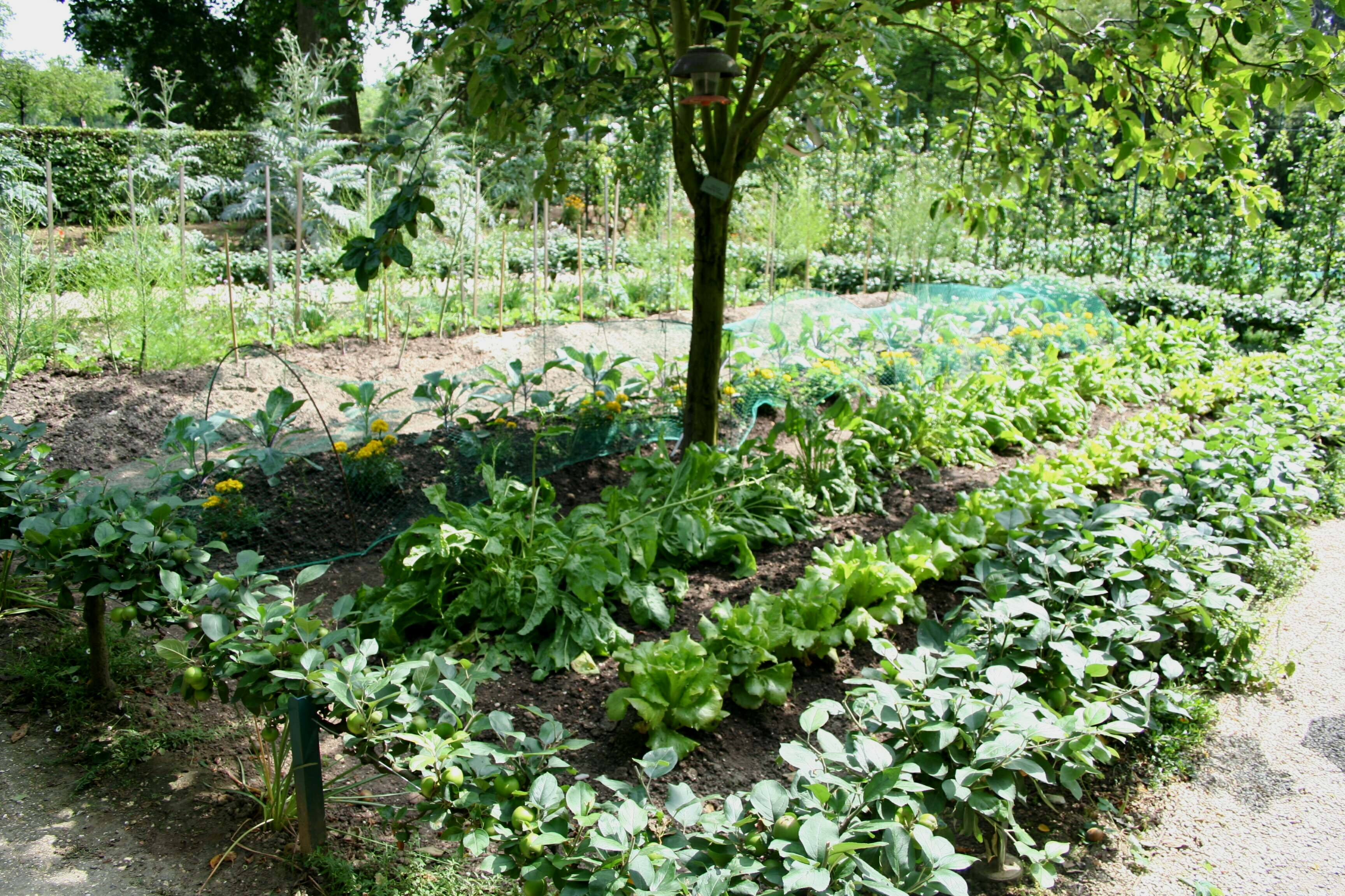 Jardin potager de Bagatelle - Paris (France)